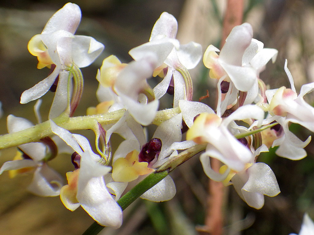 Inflorescence lâche, densément pubescent.